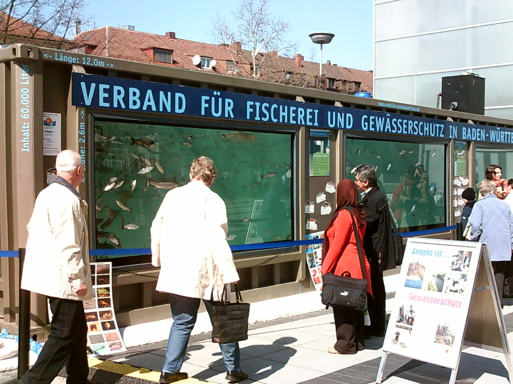 Größtes mobiles Aquarium Europas in Heilbronn